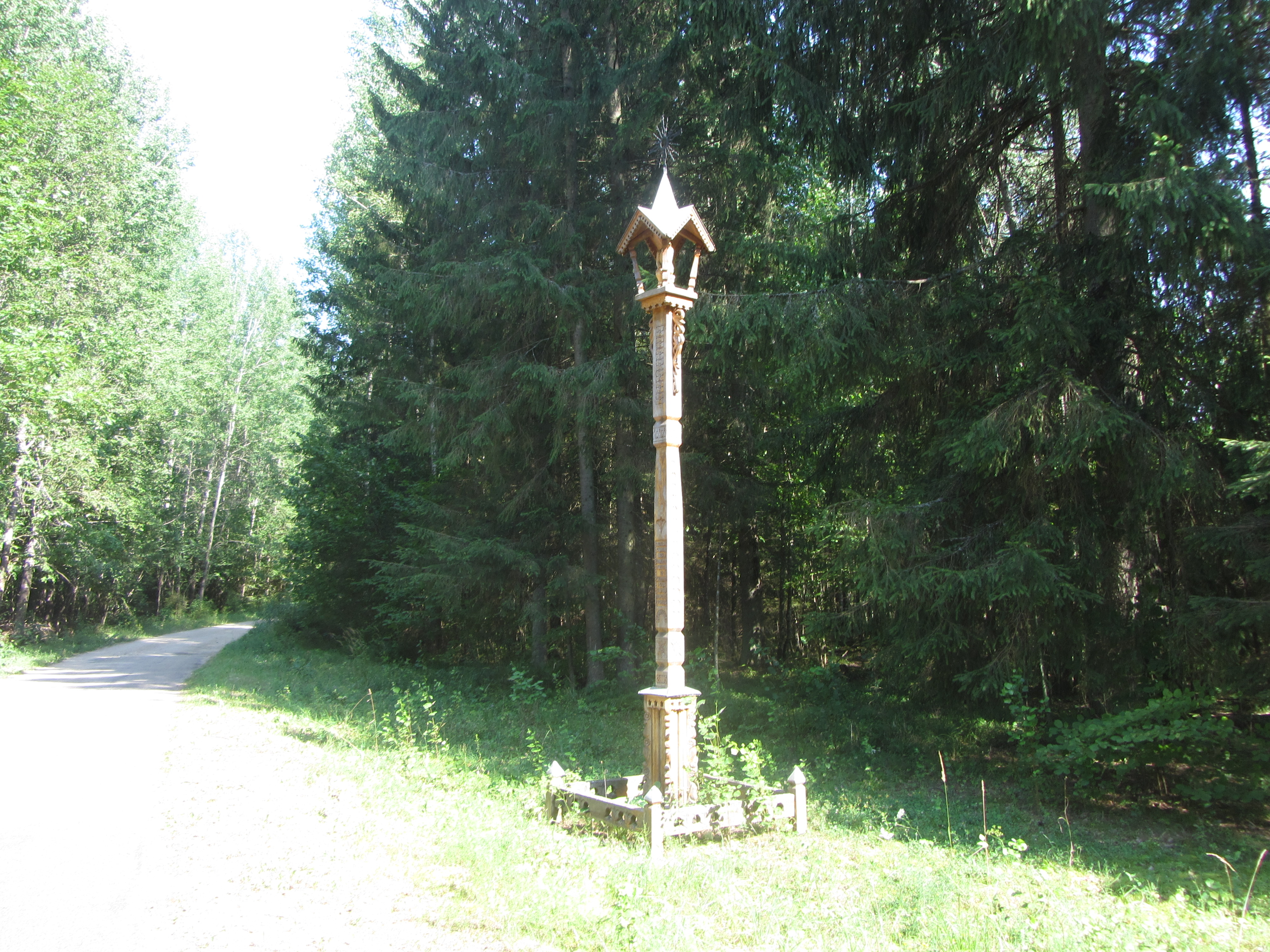 Dusetų sen., Lithuania